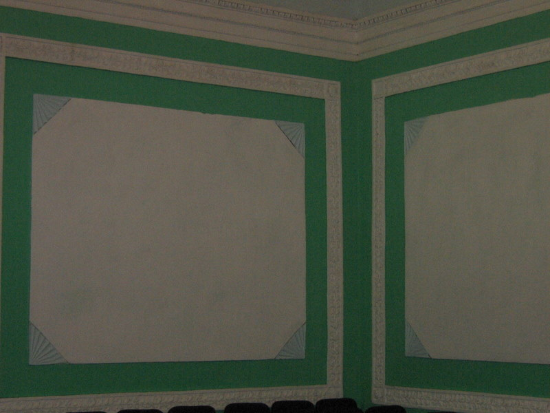 стіна